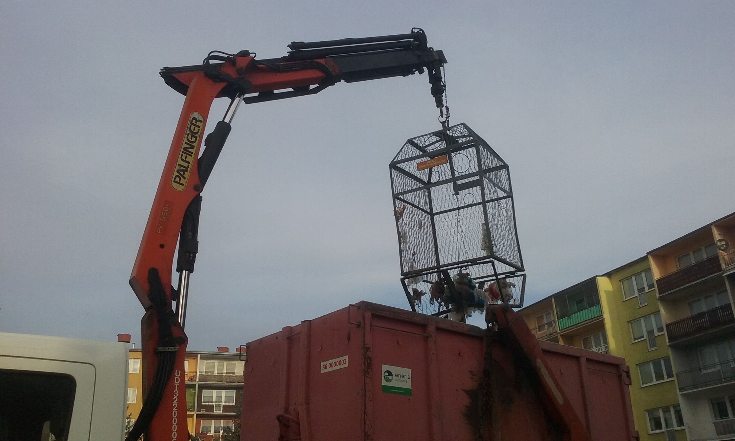 Osiedlowy punkt gromadzenia odpadów. 6 grudnia 2018 roku